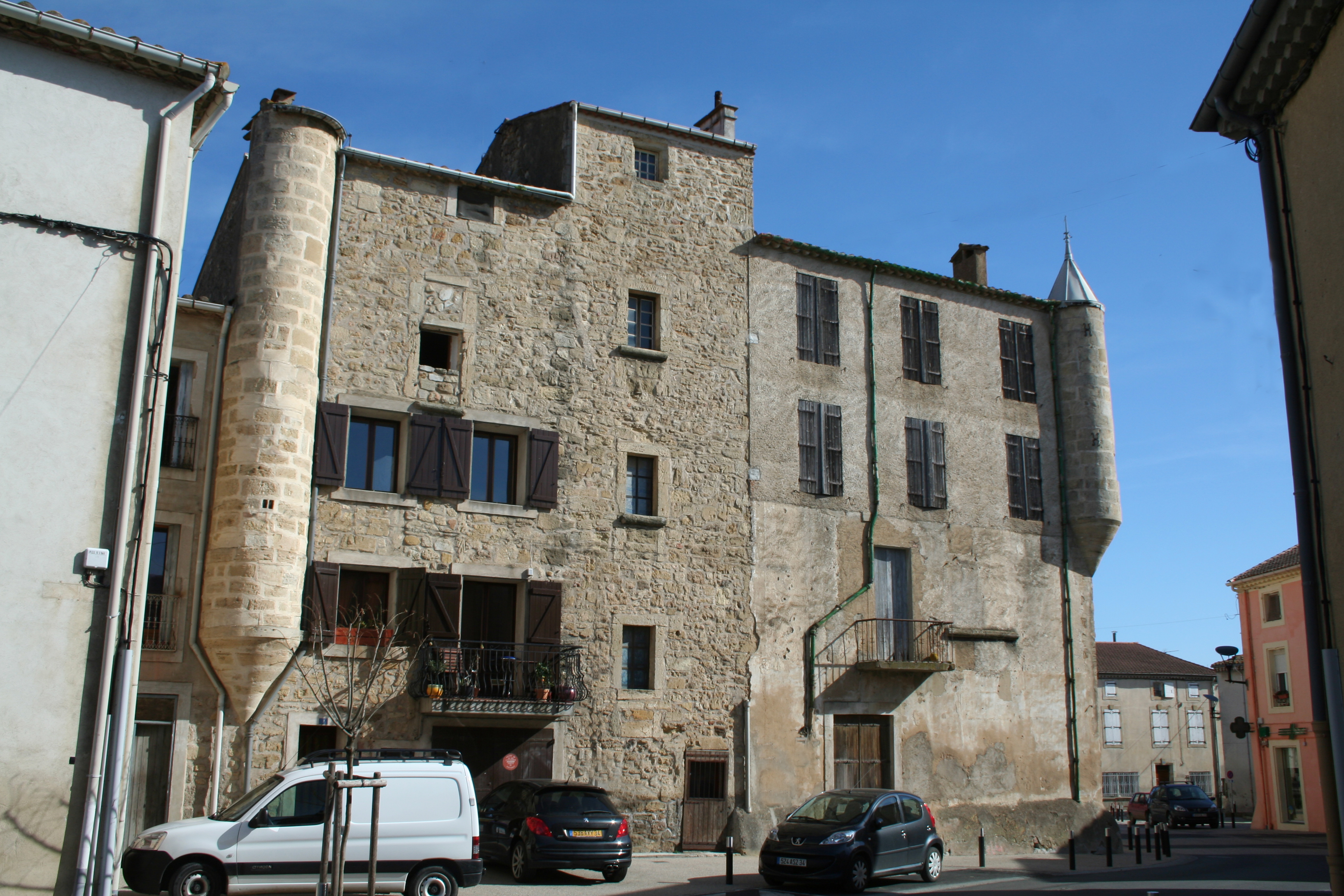 Bassan (Hérault) - château.